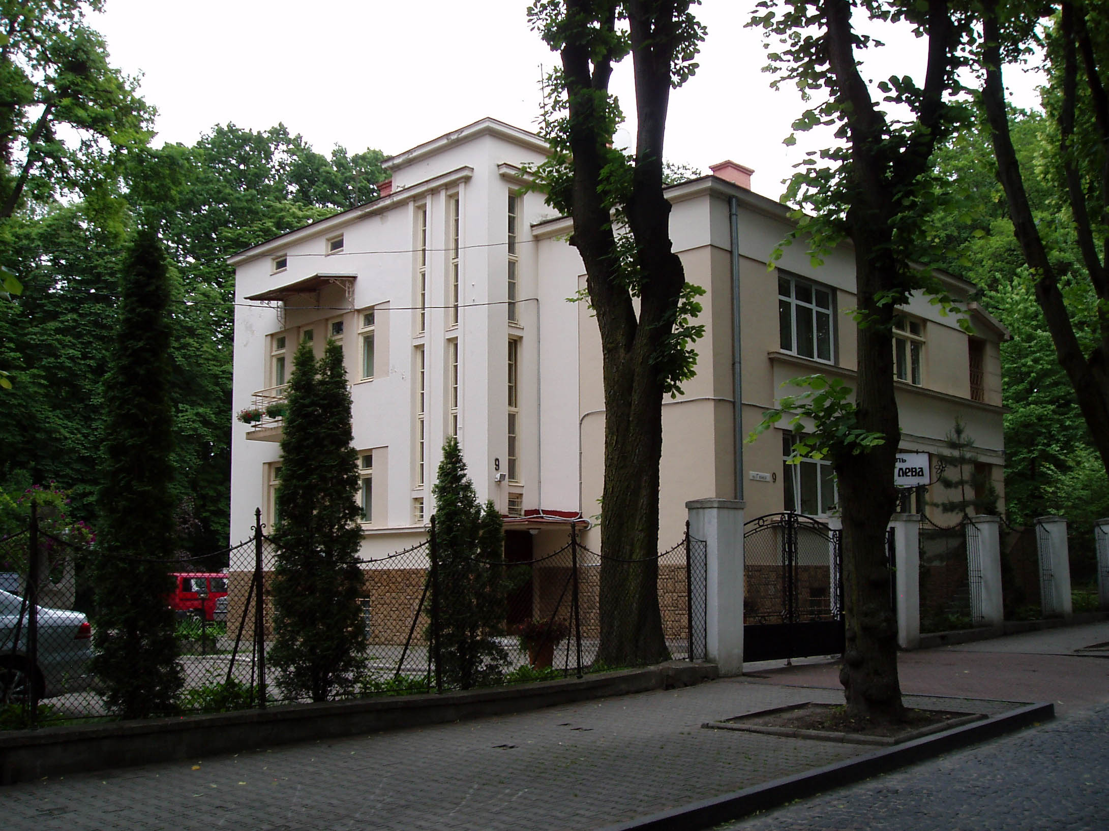 Дім № 9 на вулиці Глінки у Львові